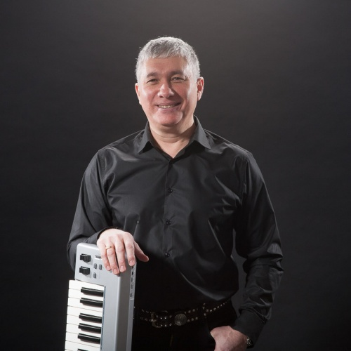 клавиши, бэк-вокал